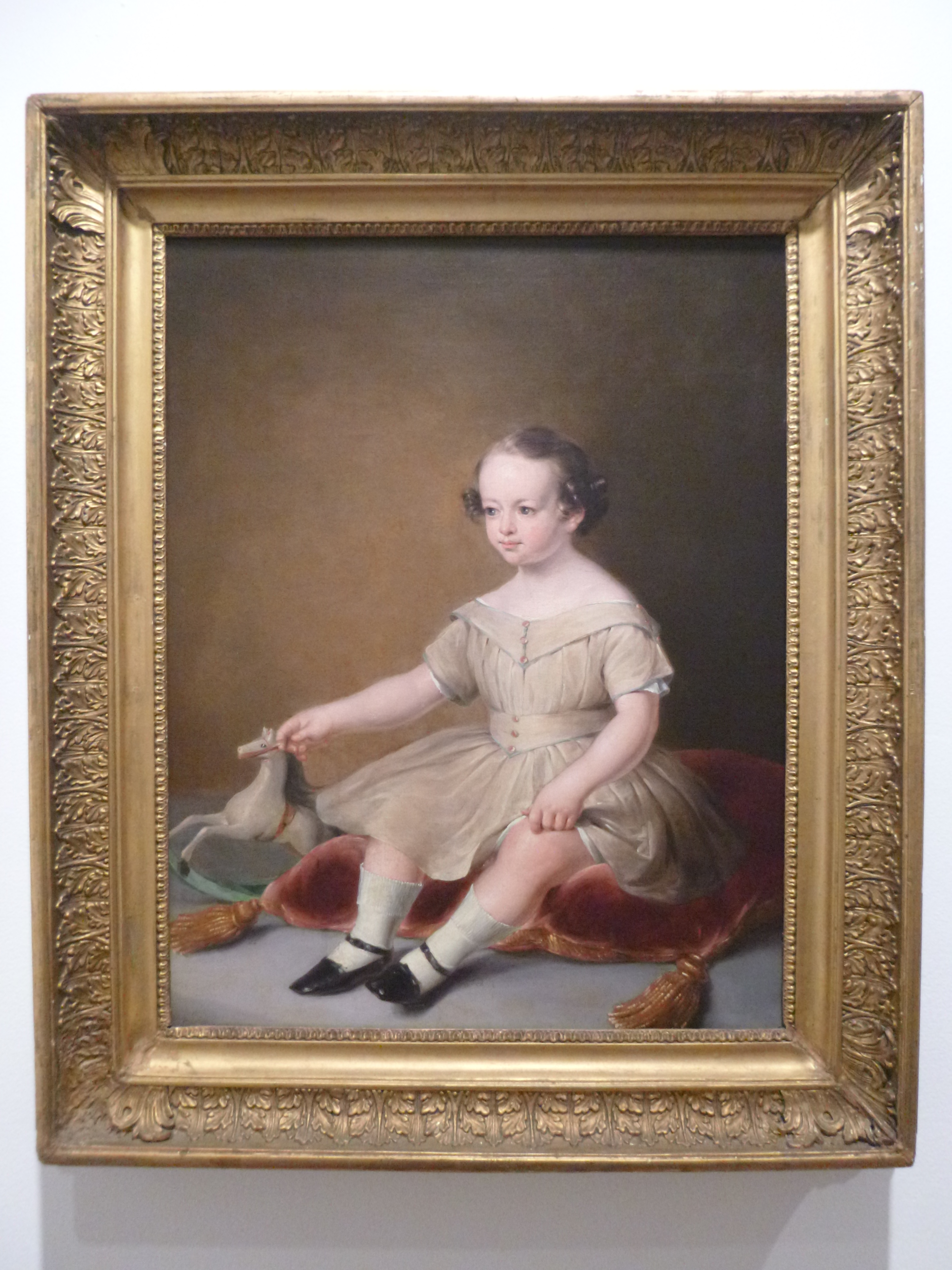 Bildnis Benjamin Disraelis als Kind (um 1808) des Malers George Henry Harlow: Kinderportrait eines kleinen Jungen in Mädchenkleidung, mit Spielzeugpferd sich beschäftigend.